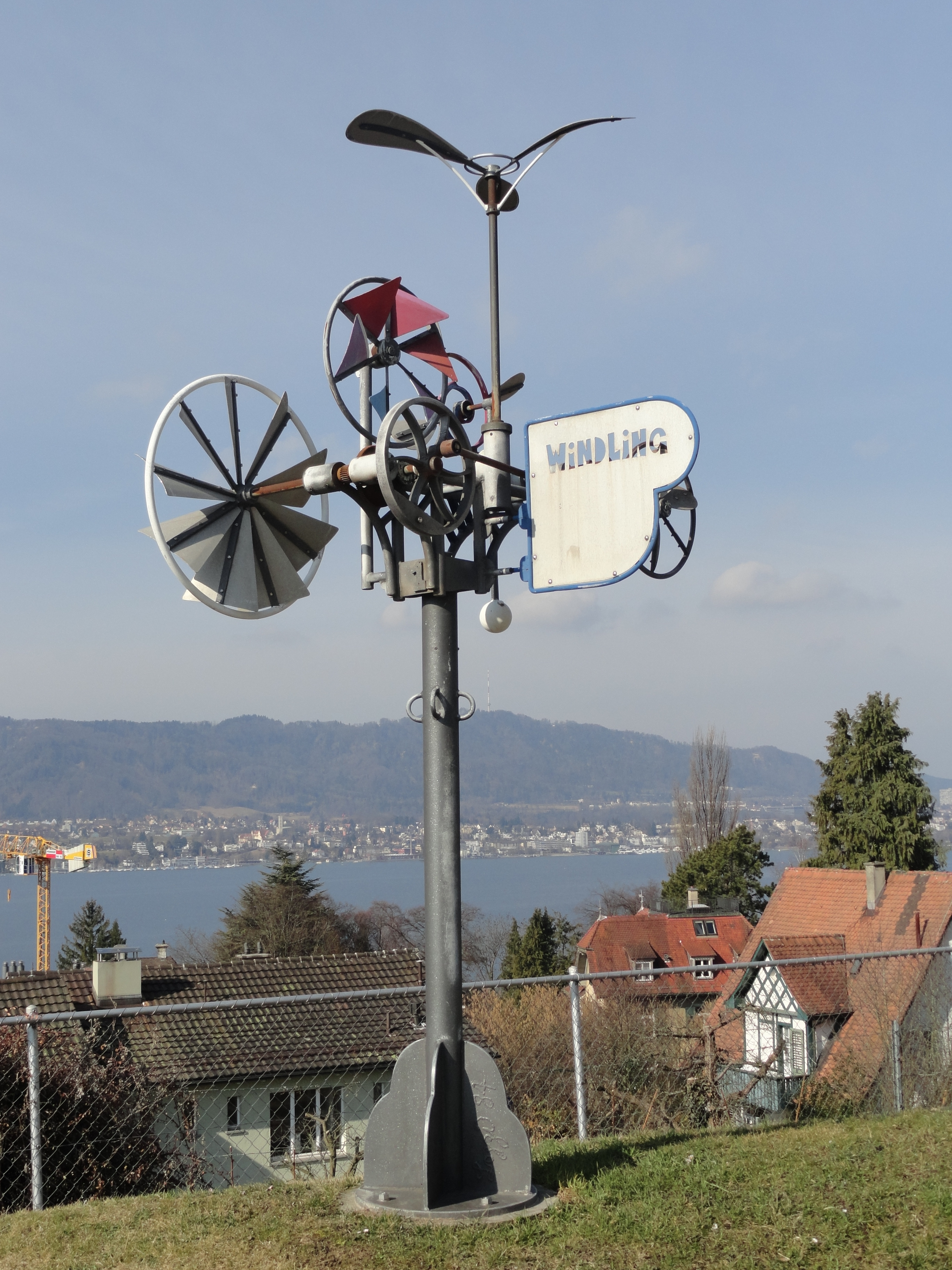 «Windling» - Skulptur von Yvan Pestalozzi auf dem Buchholzhügel in Zollikon